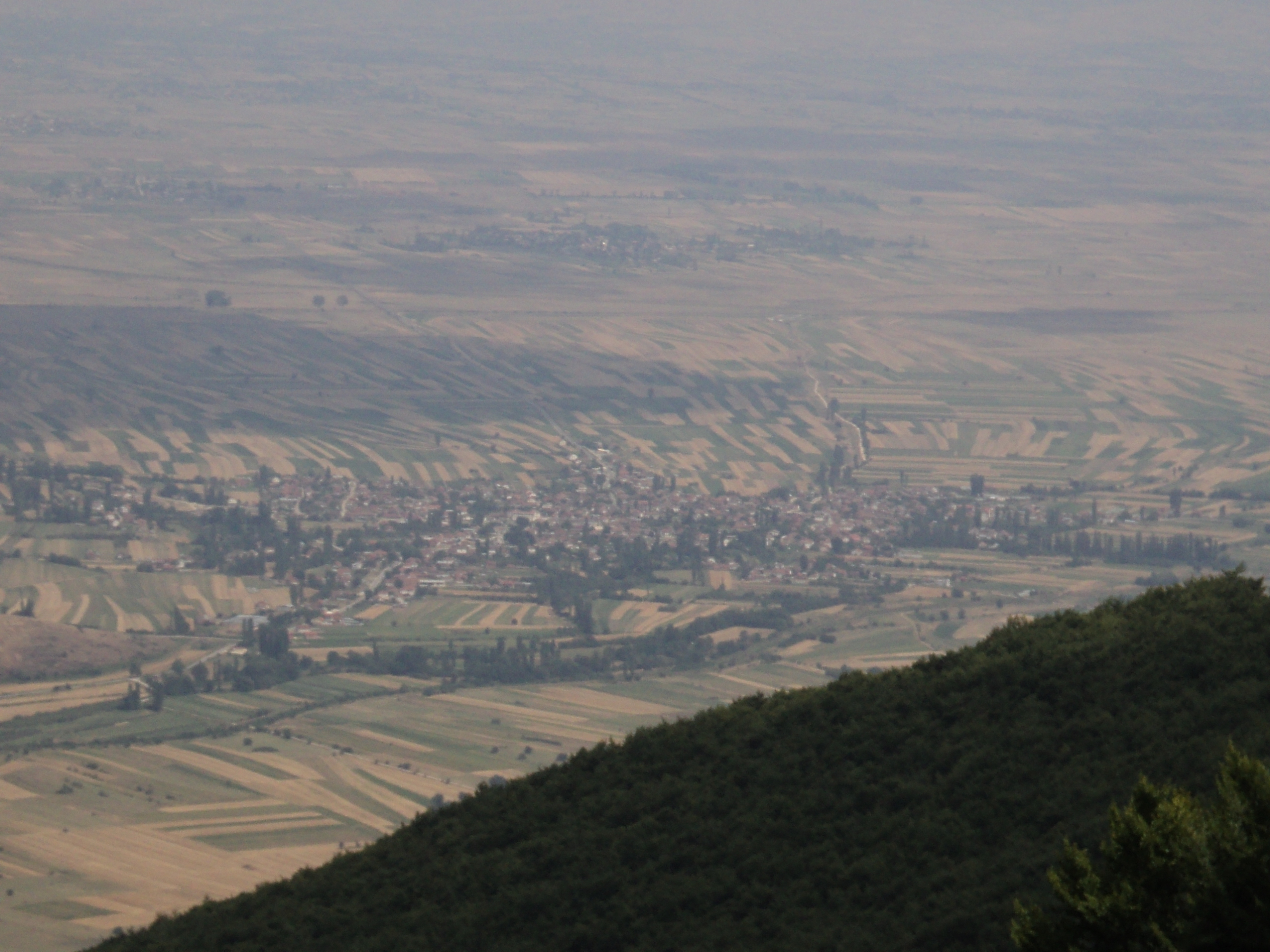 Pogled na Krivogaštane od Kruševa. Avgust 2011.